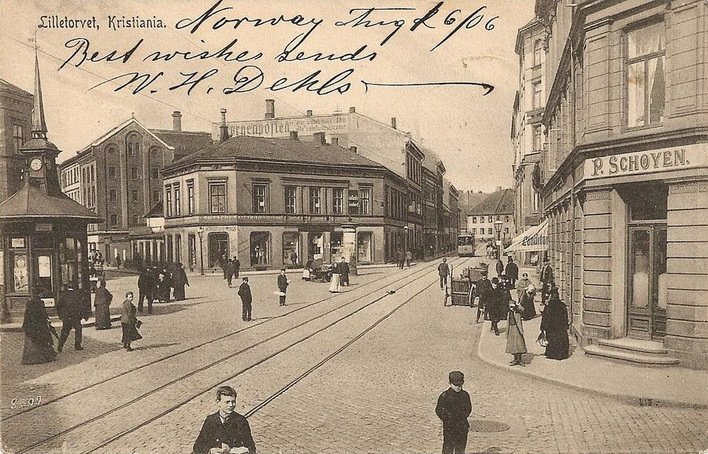 Brugata over Lilletorget opp mot Storgata, Stenersgata inn til venstre. Spaserende, Narvesens tårnkiosk, drakjerrer, trikk, torgsalg. P. Schøyen vinforretning (fra 1866) til høyre (Brugata 11). Takreklame for Morgenposten. Postkort 8307? med påskrevet hilsen.